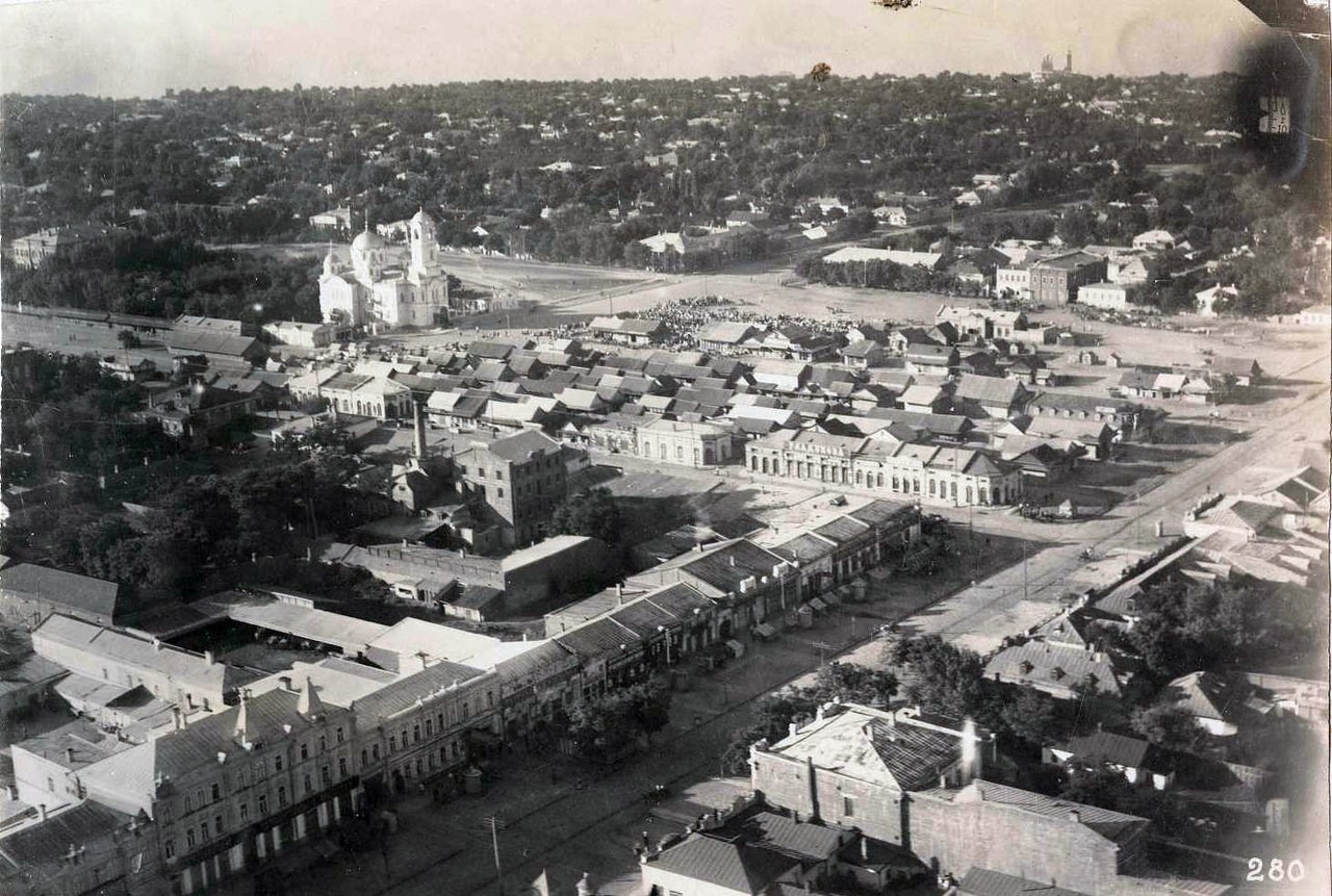 Вид на Гоголевский переулок, Таганрог, 1918. Аэрофотосъемка, период немецкой оккупации Таганрога.